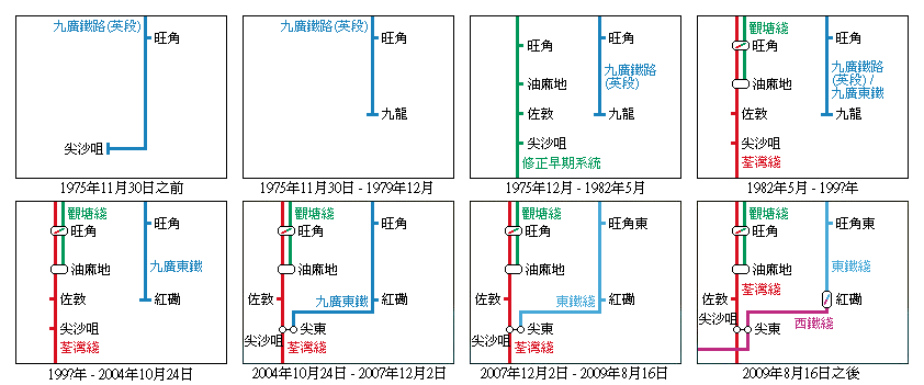 港鐵東鐵綫南行終站及附近觀塘綫、荃灣綫(旺角至尖沙咀一段)和東鐵綫旺角東站之變遷 圖片描述： 1.九廣鐵路(英段)南行終站遷至九龍站前 2.九廣英段南行終站遷至九龍站 3.地鐵修正早期系統通車 4.荃灣綫通車；修正早期系統一分為二；1996年九廣鐵路(英段)易名為九廣東鐵 5.九龍站易名紅磡站 6.東鐵南行終站延伸至尖東站 7.兩鐵合併，東鐵易名為東鐵綫；東鐵旺角站易名為旺角東站 8.九龍南綫落成，東鐵綫改回以紅磡為南行終站，尖東站成為西鐵綫中途站